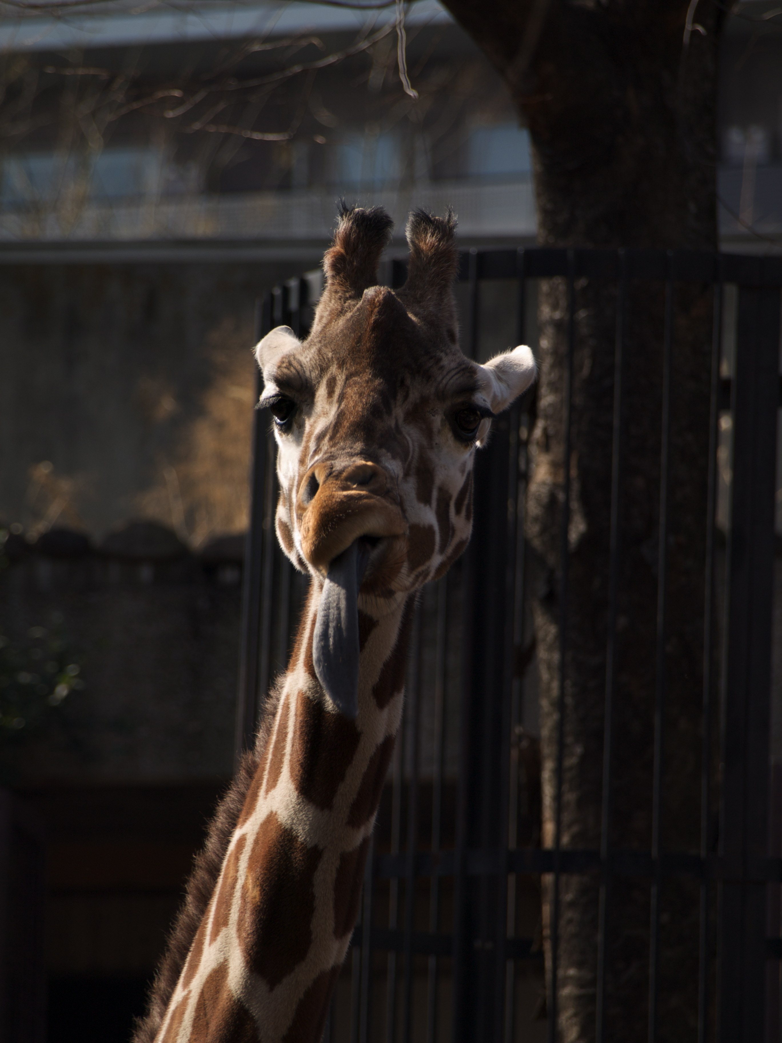 キリン/giraffe